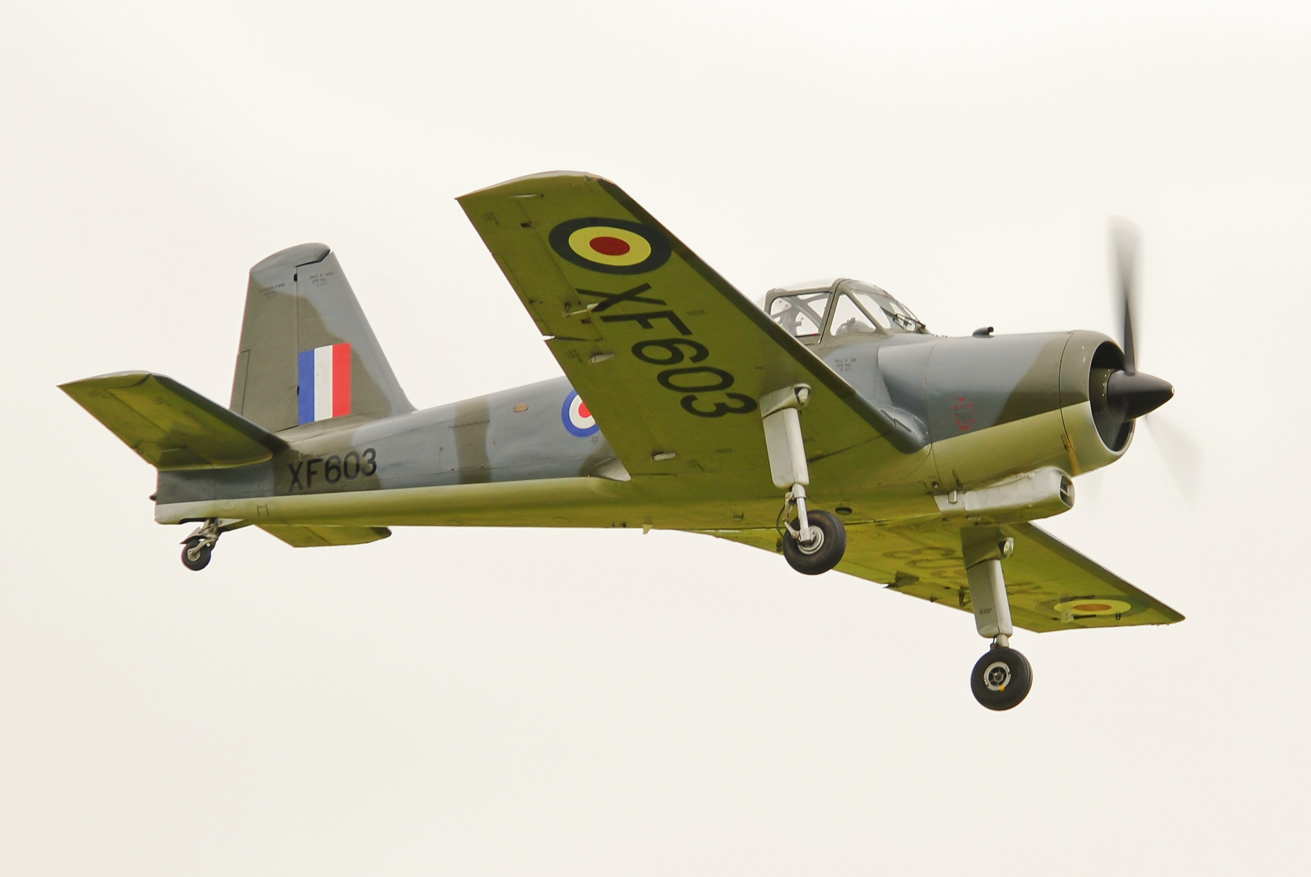 Piston Provost